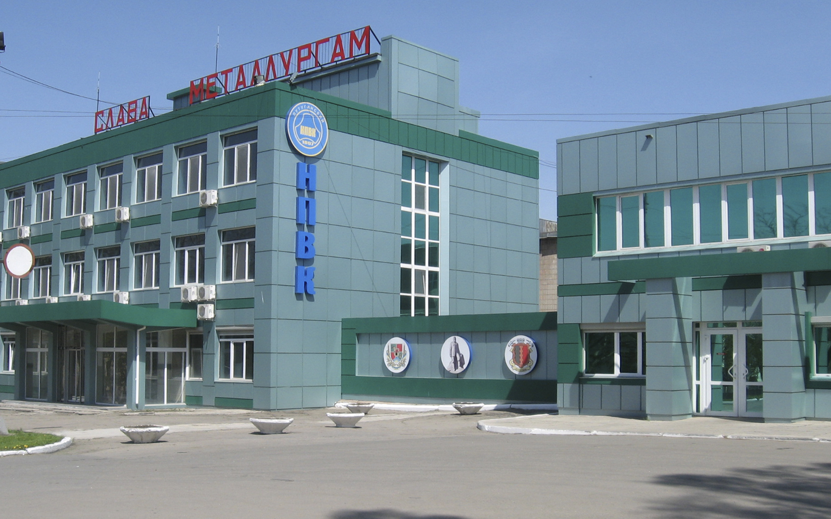 Лутугинский НПВК, вид на проходную